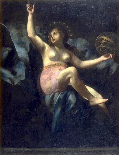 195 × 150 cm